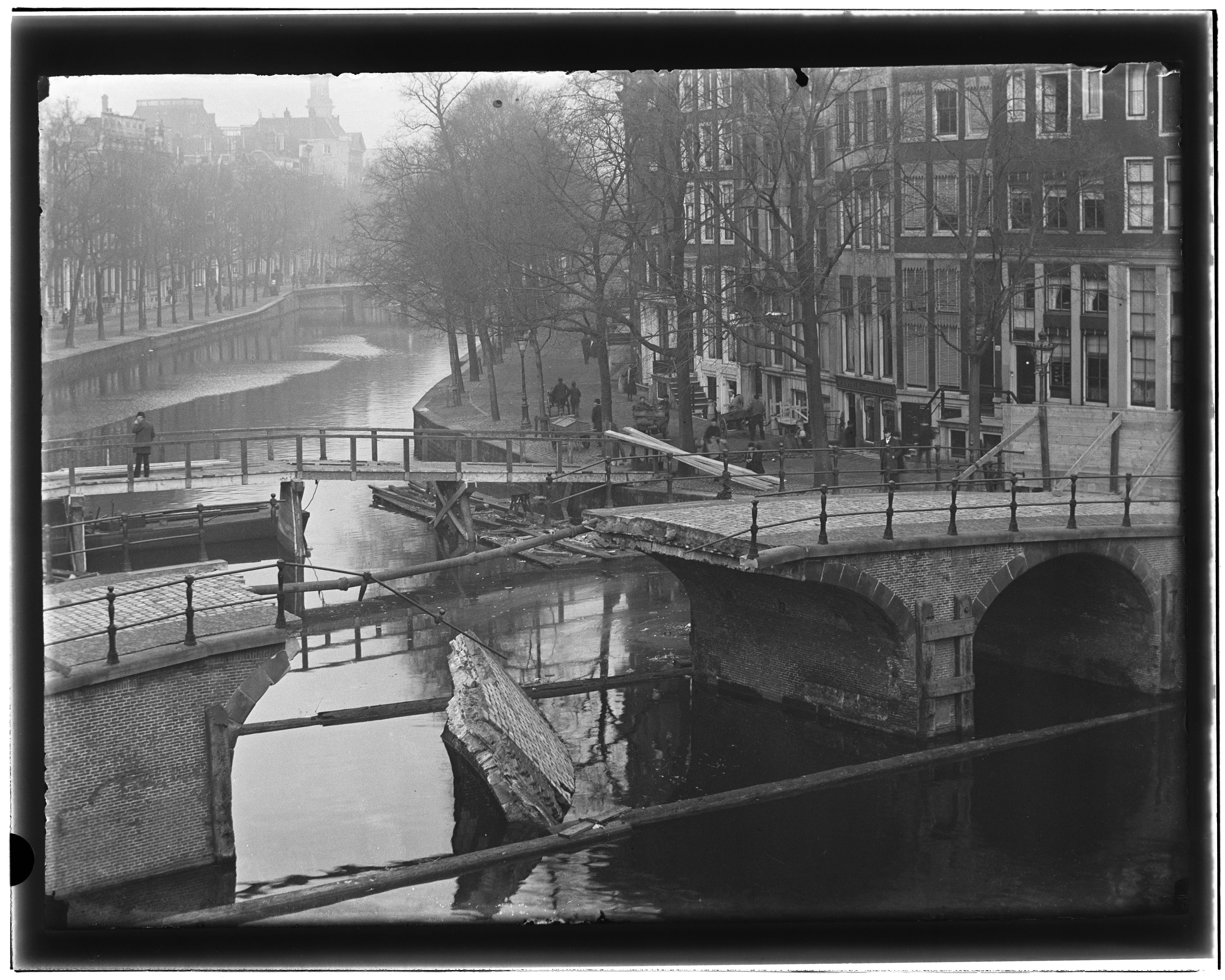 Beschrijving Keizersgracht 405 t/m 419 (rechts``, v.l.n.r.) Ingestorte brug nr. 46 voor de Leidsegracht met daarachter de hulpbrug``, geziennaar brug nr. 47 tussen de Runstraat (links) en de Huidenstraat (rechts)(op de achtergrond). Documenttype foto Vervaardiger Olie``, Jacob (1834-1905) Collectie Collectie Jacob Olie Jbz. Datering 25 november 1894 Geografische naam Keizersgracht Inventarissen Afbeeldingsbestand 10019A000211 Generated with Dememorixer